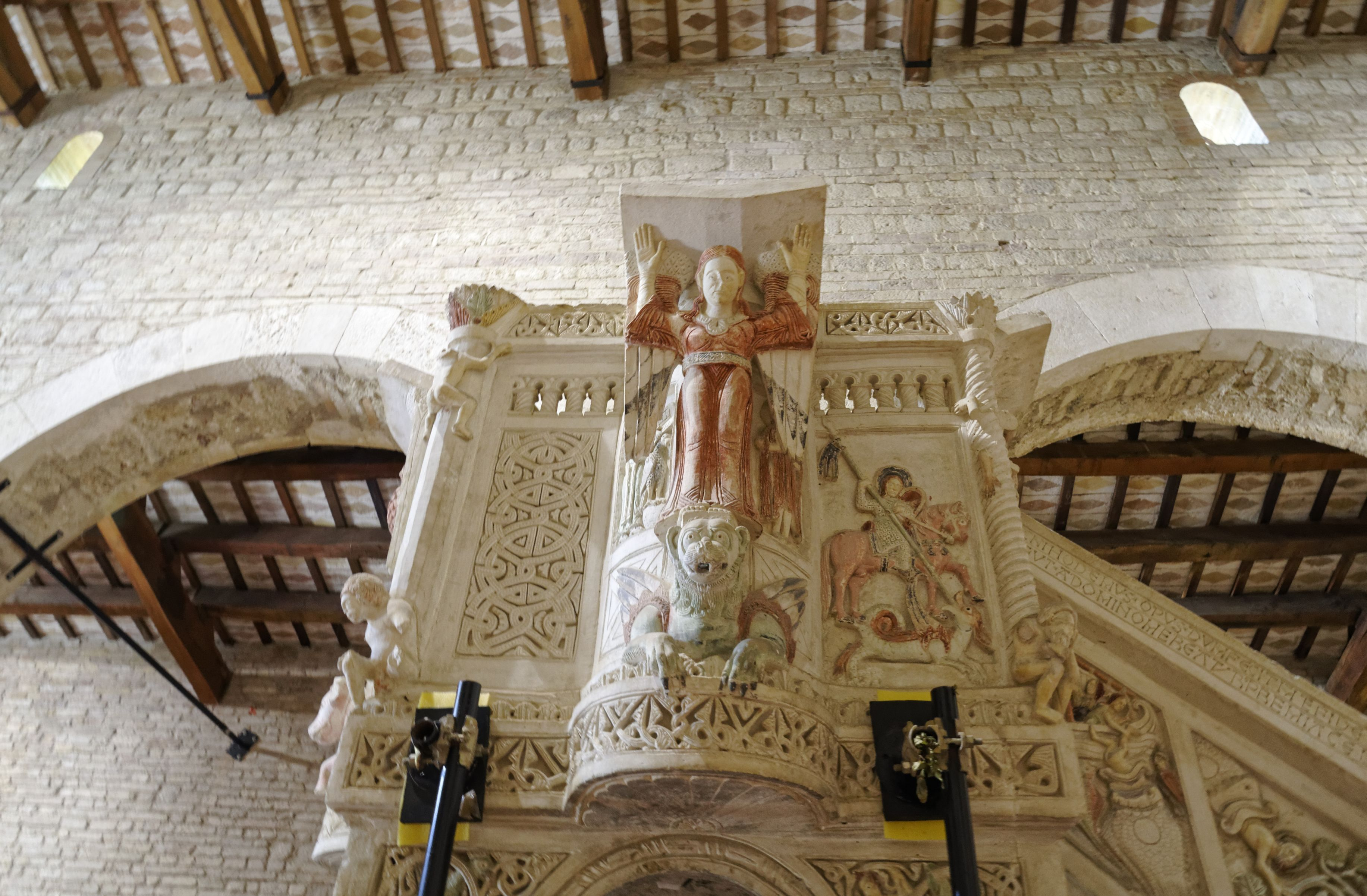 Santa Maria del Lago (Moscufo) 2015